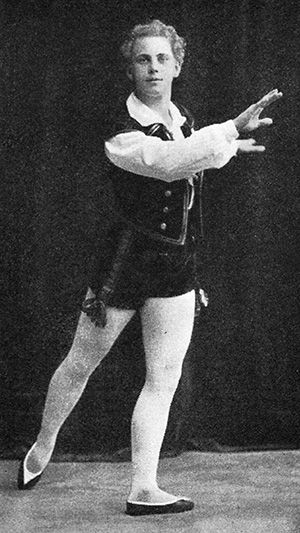 Oscar Tropp som nyutnämnd premiärdansör